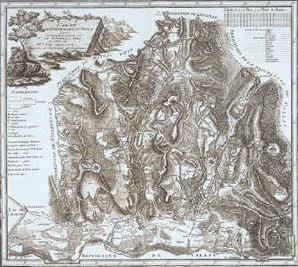 Carte du Gouvernement d'Aigle, levée topographiquement par Mr. (Isaac-Gamaliel) de Rovéréa, père, et réduit(e) par Mr. J(ean) Sam(uel) Grouner. Anhang zu François-Samuel Wild: Essai sur la montagne salifère du gouvernement d’Aigle, Genève 1788.